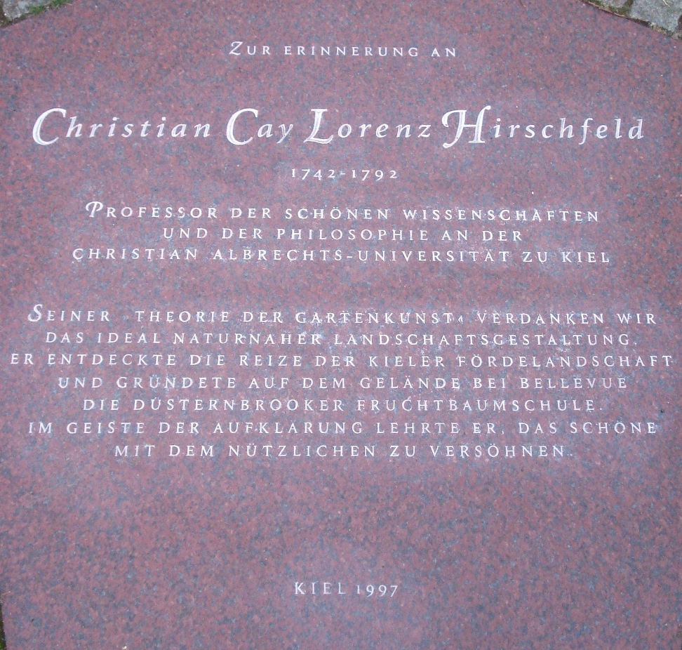 Hirschfeld,_Christian_Cay_Lorenz_-_Gedenktafel